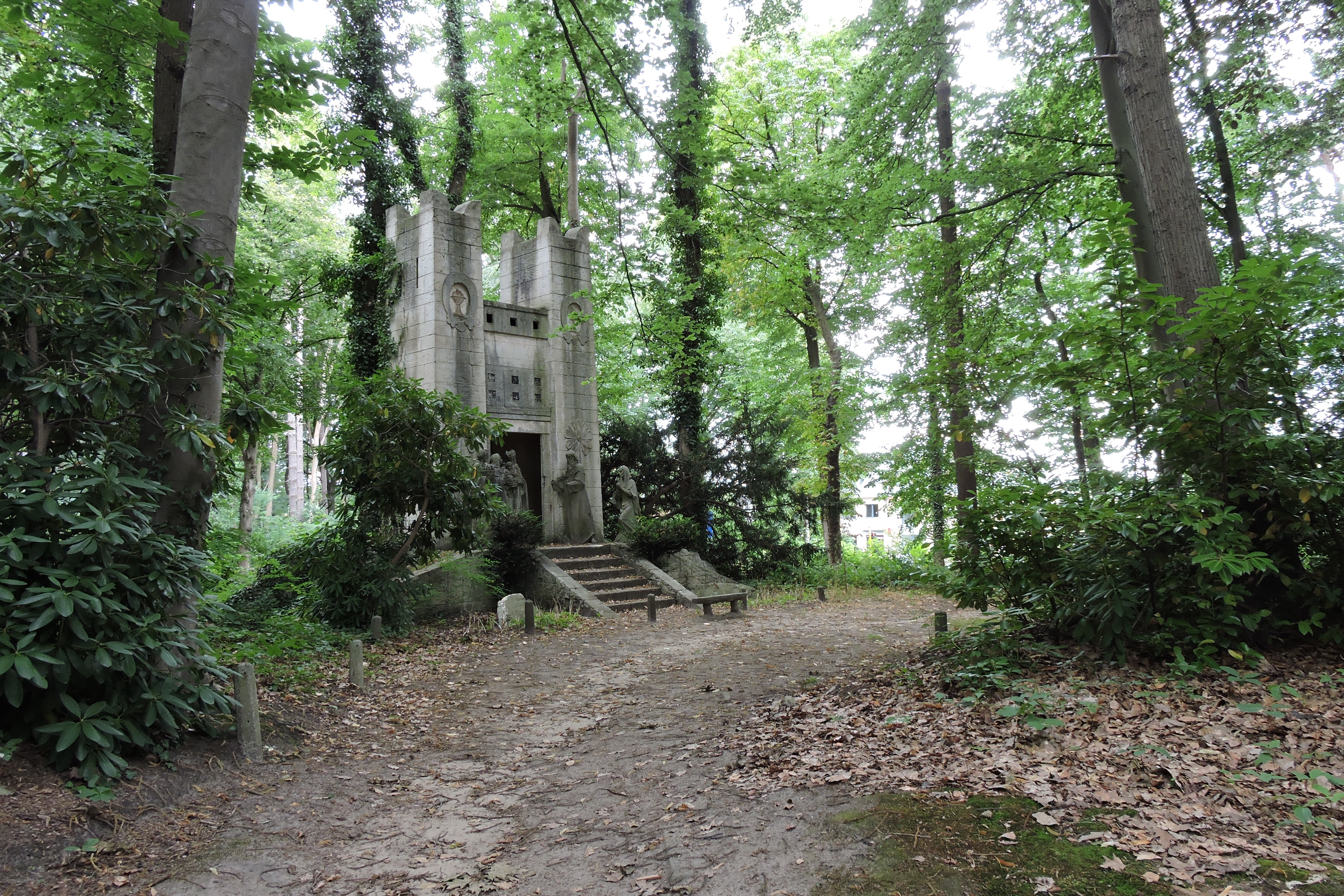 Eerste statie van het Mariapark in Averbode (foto 2015)